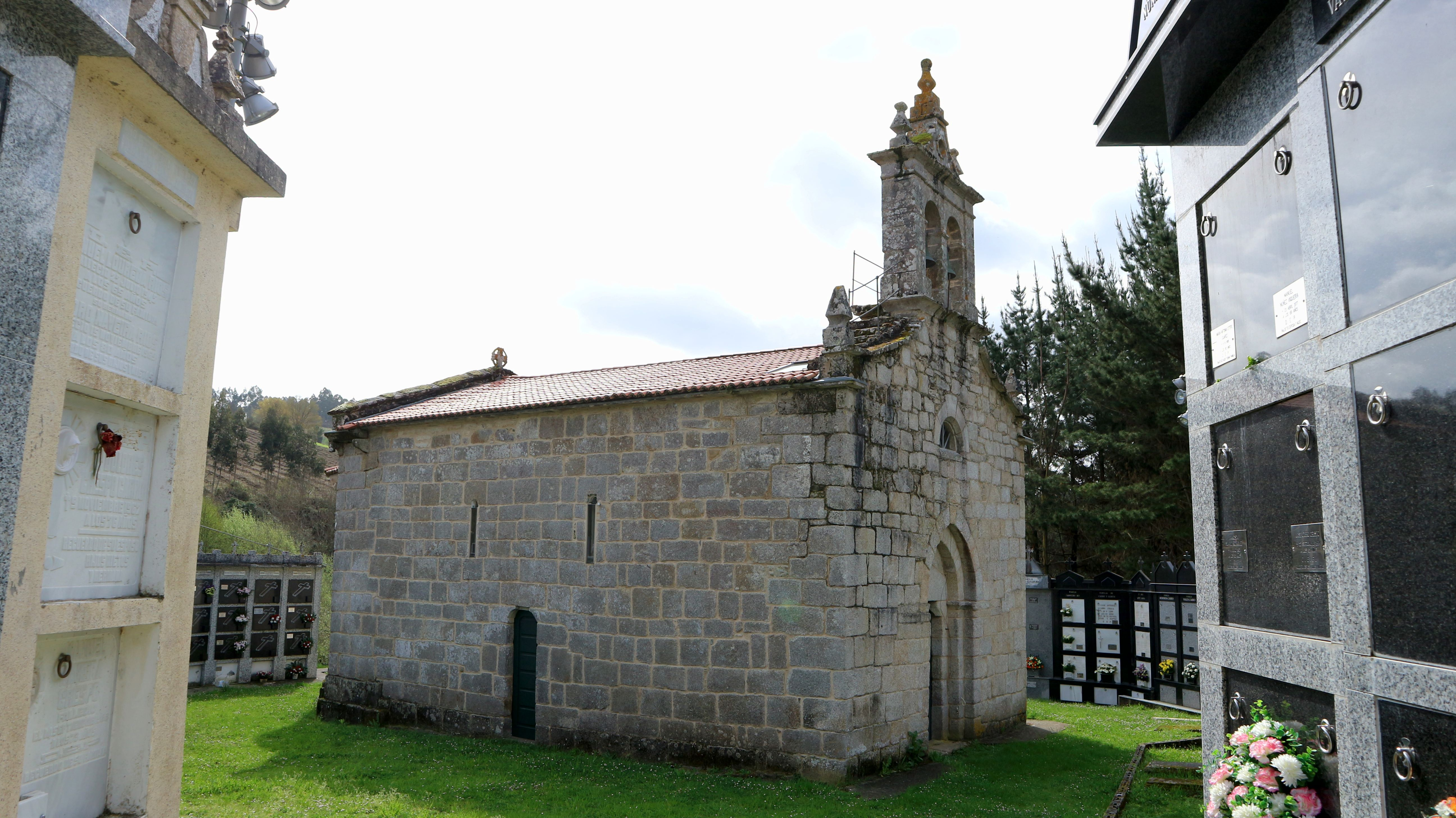 Igrexa de San María de Cuíña. Cuíña, Oza-Cesuras.